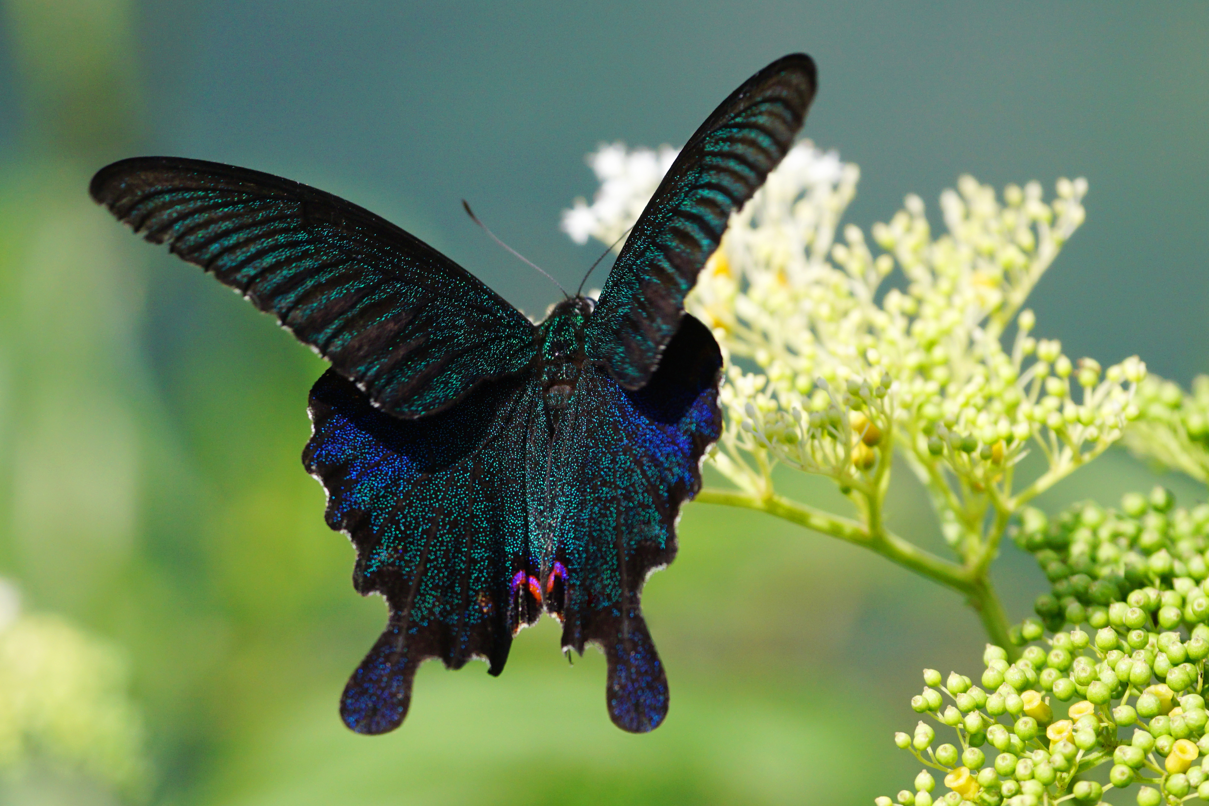 穹翠鳳蝶 Papilio dialis tatsuta